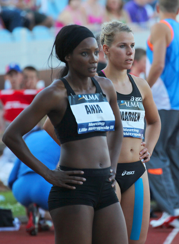 Emma Ania, Hanna Mariën